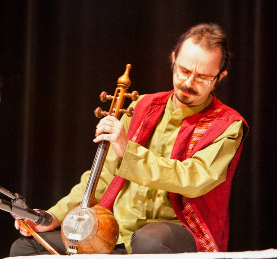 عکس از آلبوم شخصی مهدی باقری ، با اجازه نشر از خود ایشان